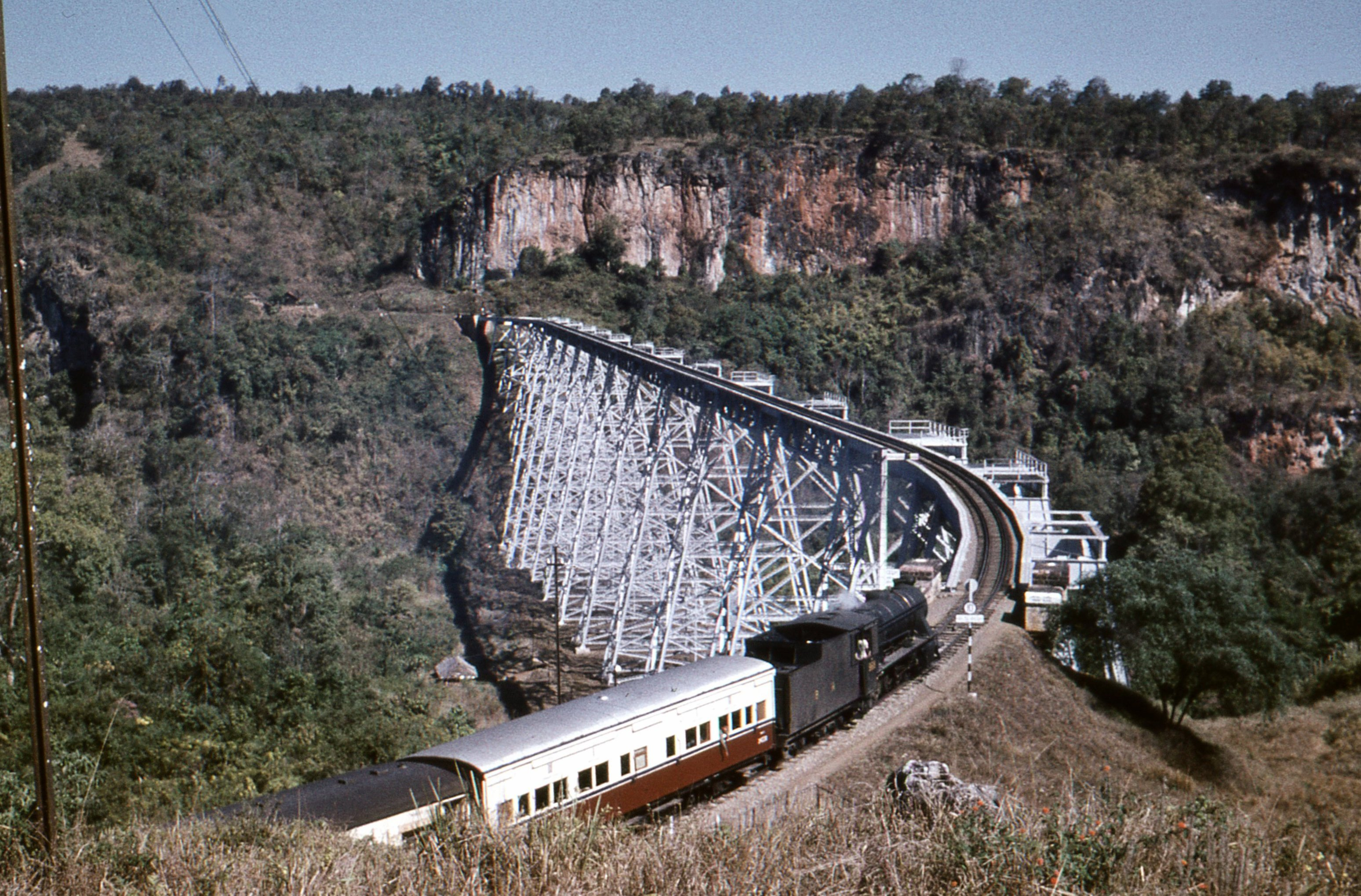 Goteik-Viadukt mit auffahrendem Zug